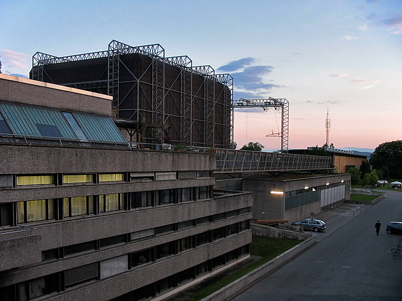 TU Graz: Hochspannungslabor in der Infeldgasse